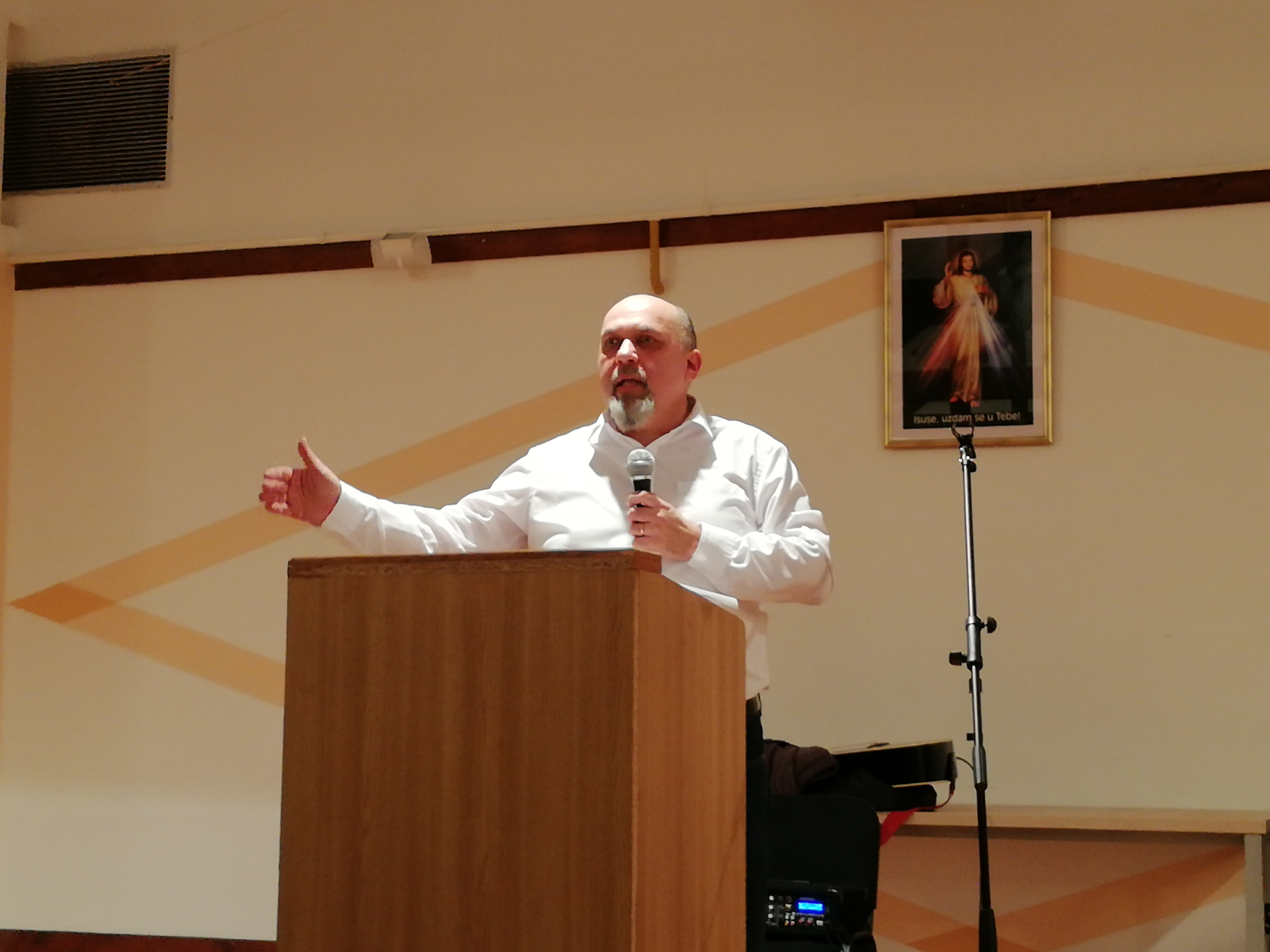 Seminar u Čepinu, 2018.